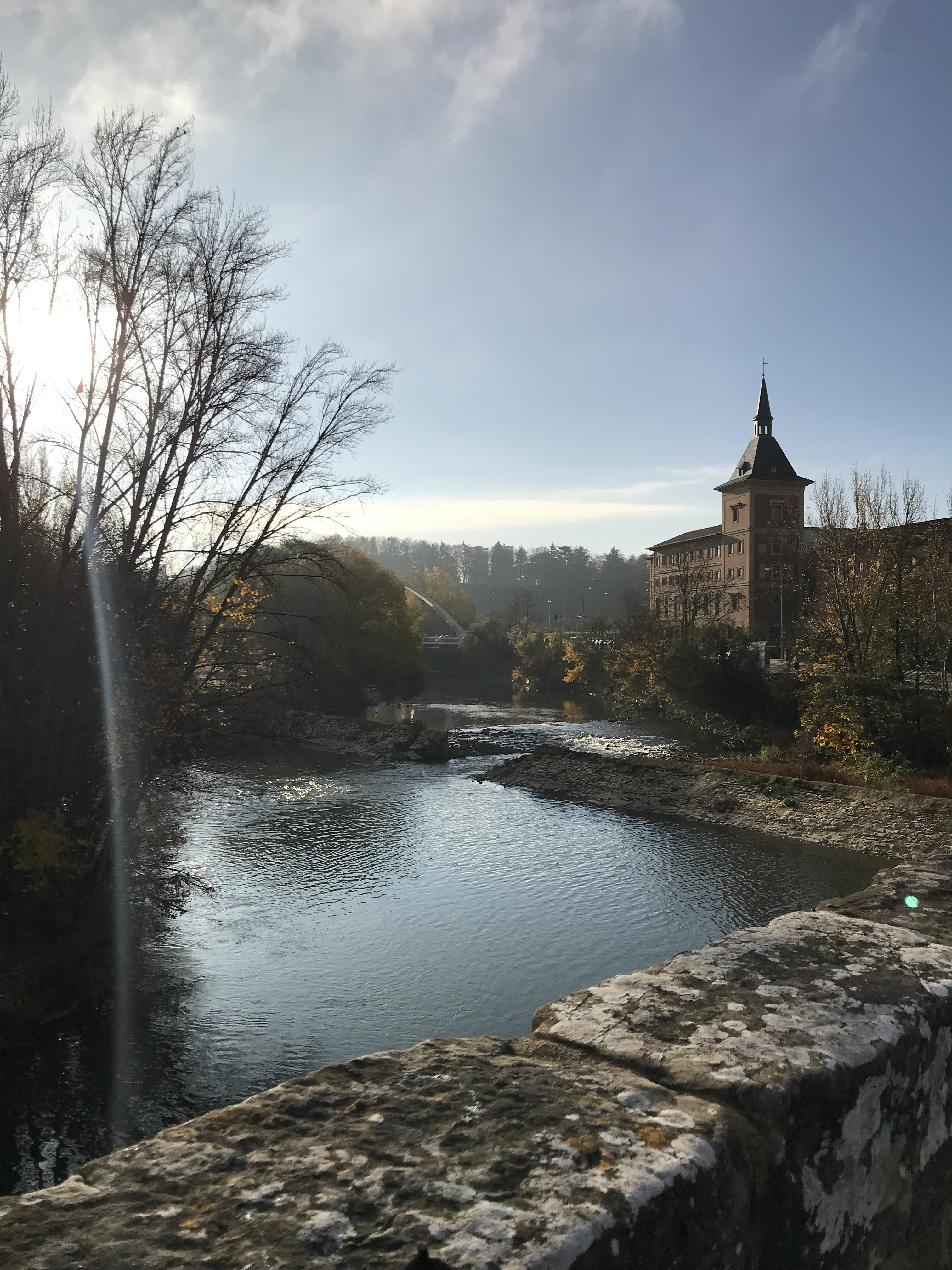 Río Arga desde el Puente de Santa Engrancia, situado en el barrio de la Rotxapea, Pamplona, Navarra.